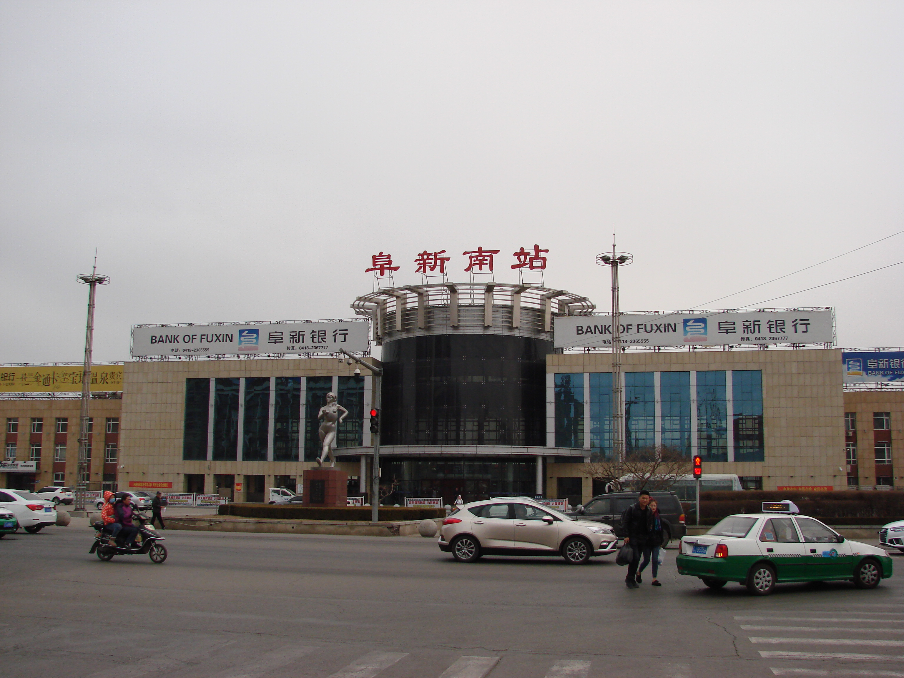 阜新南站站房